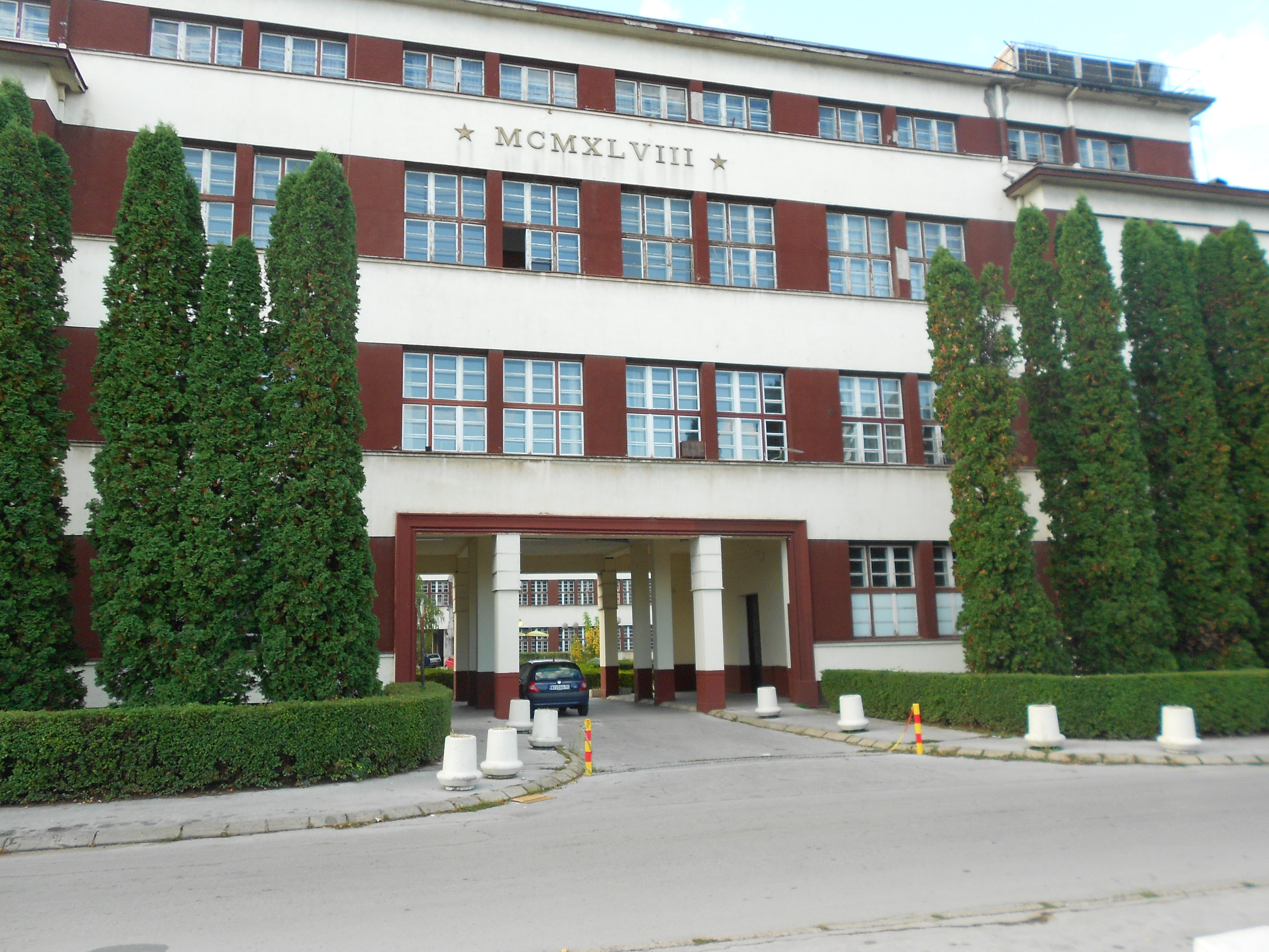 Драган Цветковић Ниш Сопствена слика "Зграда Еи холдинга 2013. године"